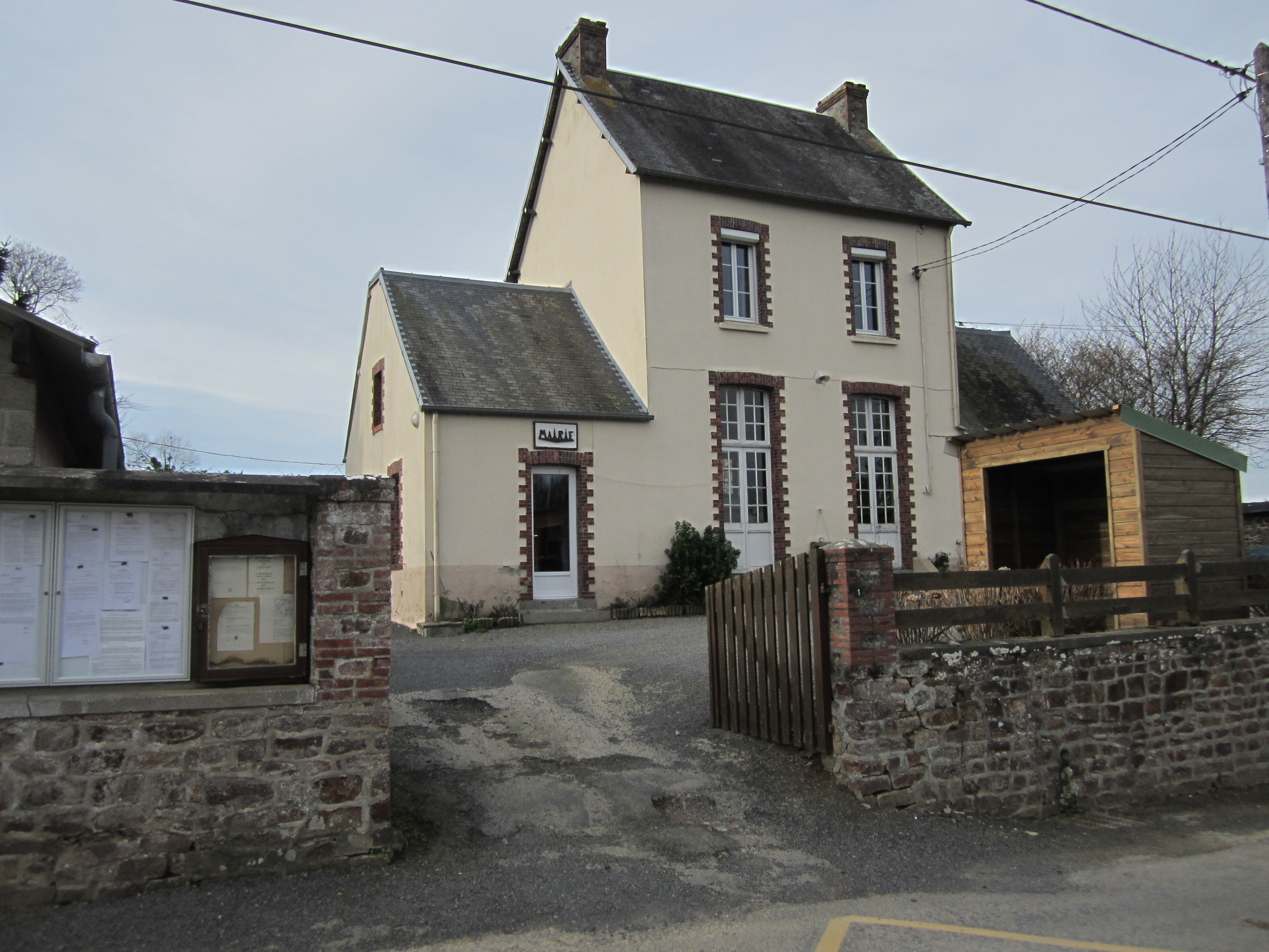 Grimesnil, Manche